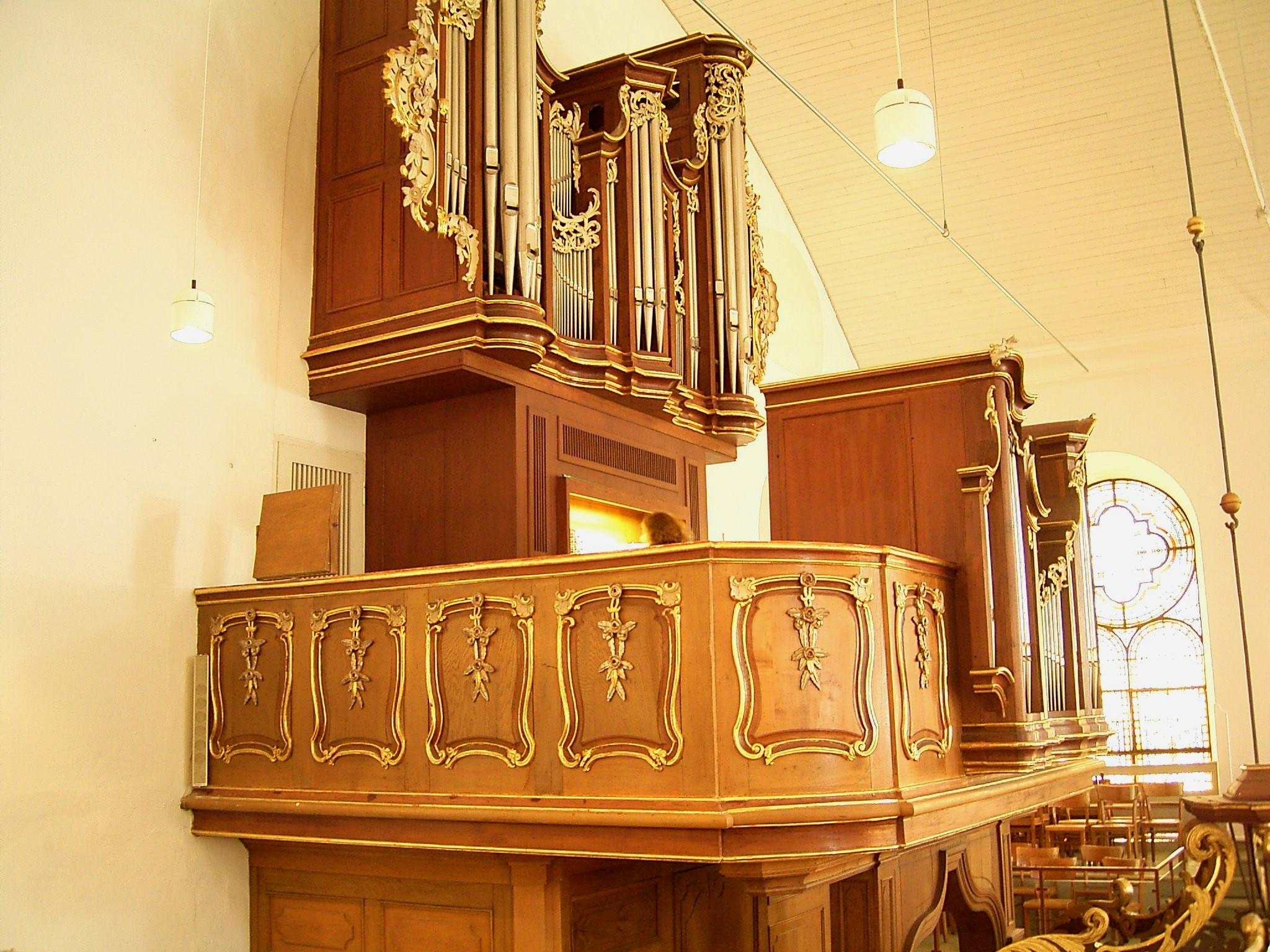 Evangelische Stadtkirche in der Altstadt von Remscheid-Lennep